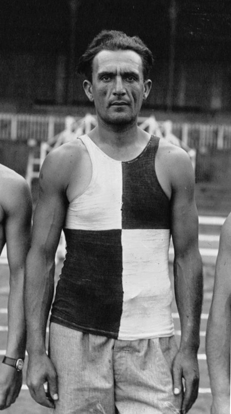 Pasciati, Tugnoli, Lorenzi : athlètes italiens du poids et du disque : [photographie de presse] / Agence Meurisse (Tugnoli's photo is also here [1])